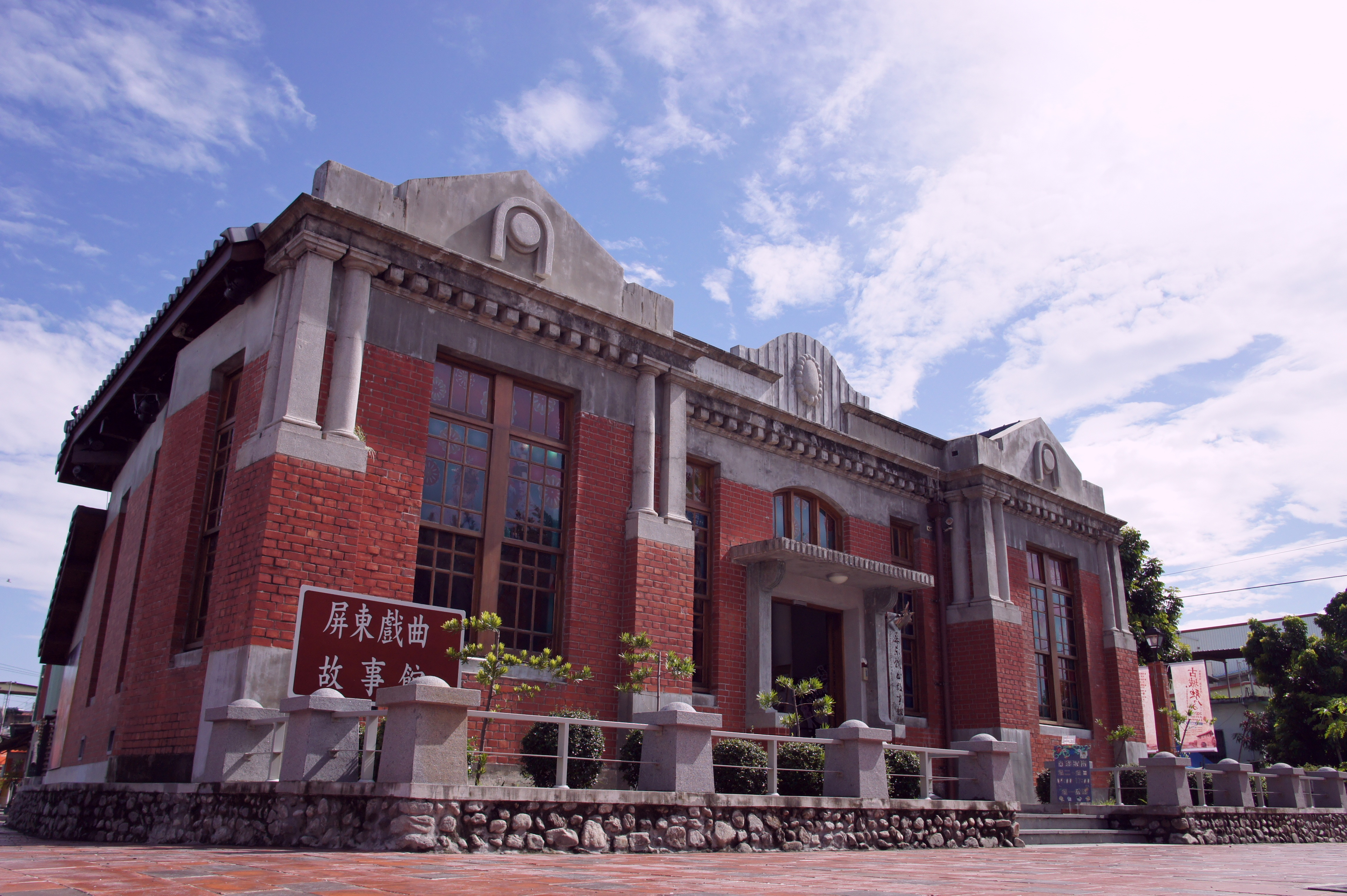 由舊潮州郵局整修的屏東戲曲故事館，是古蹟再利用的典範。